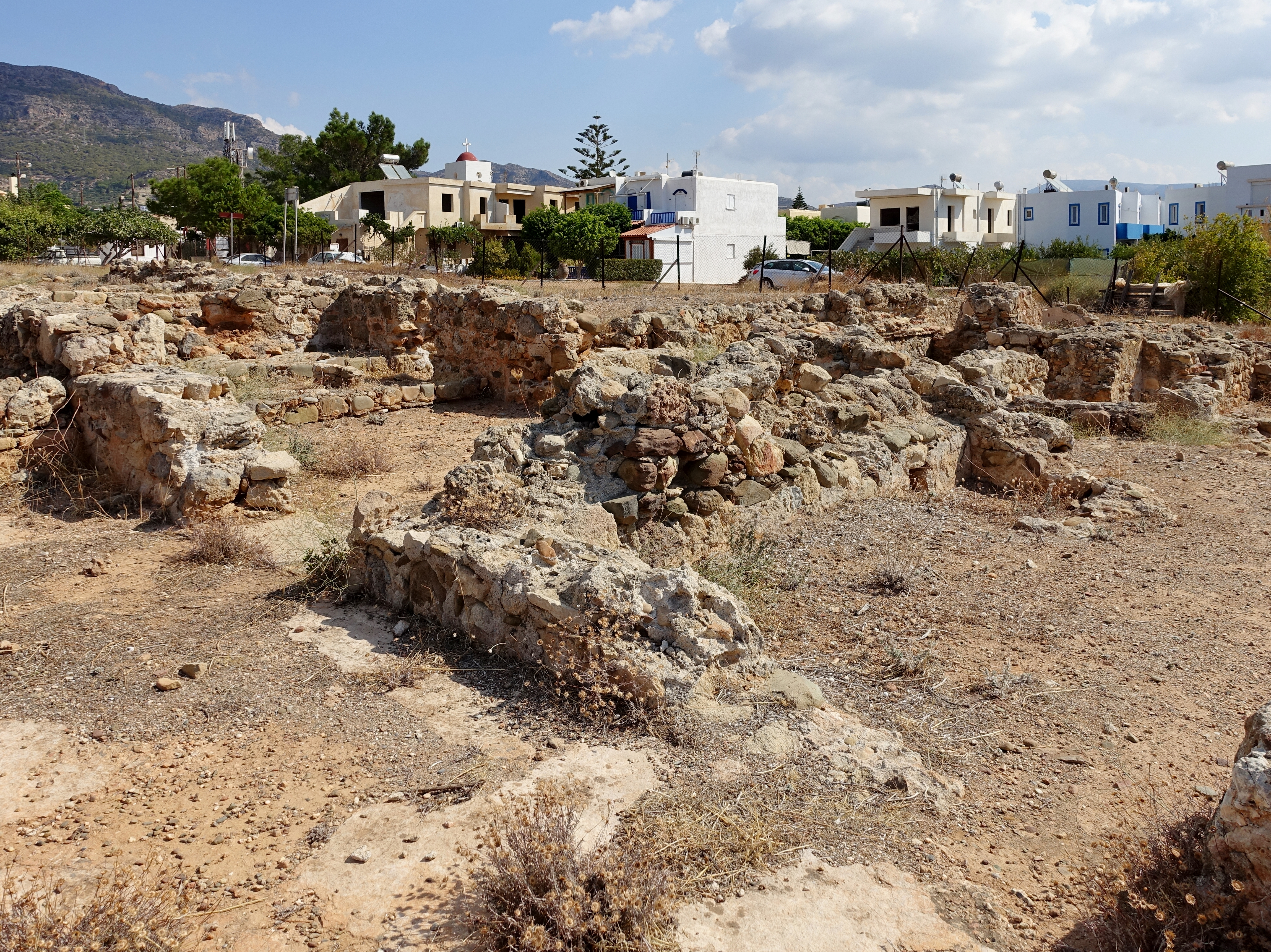 Ausgrabungsstätte der römischen Villa von Makrygialos, Kreta, Griechenland